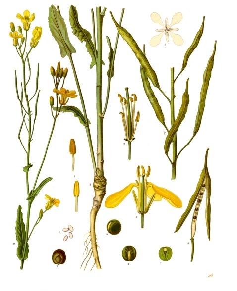 Raps. A B Pflanze in natürl. Grösse; C Theil der Fruchttraube, desgl.; 1 Blüthe, schematisch, vergrössert; 2 dieselbe von der Seite, stärker vergrössert; 3 innere Blüthe, desgl.; 4 Staubgefässe, desgl.; 5 Pollenkörner, desgl.; 6 aufgesprungene Frucht, nat. Grösse; 7 Same, vergrössert; 8, 9, 10 derselbe ohne Samenschale, desgl.